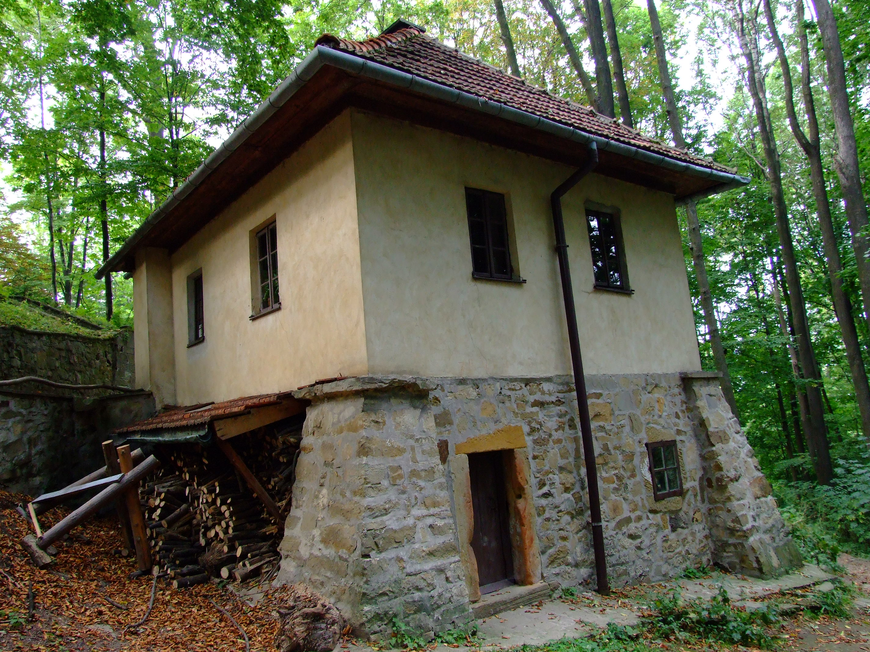 Sanktuarium pasyjno-maryjne w Kalwarii Zebrzydowskiej